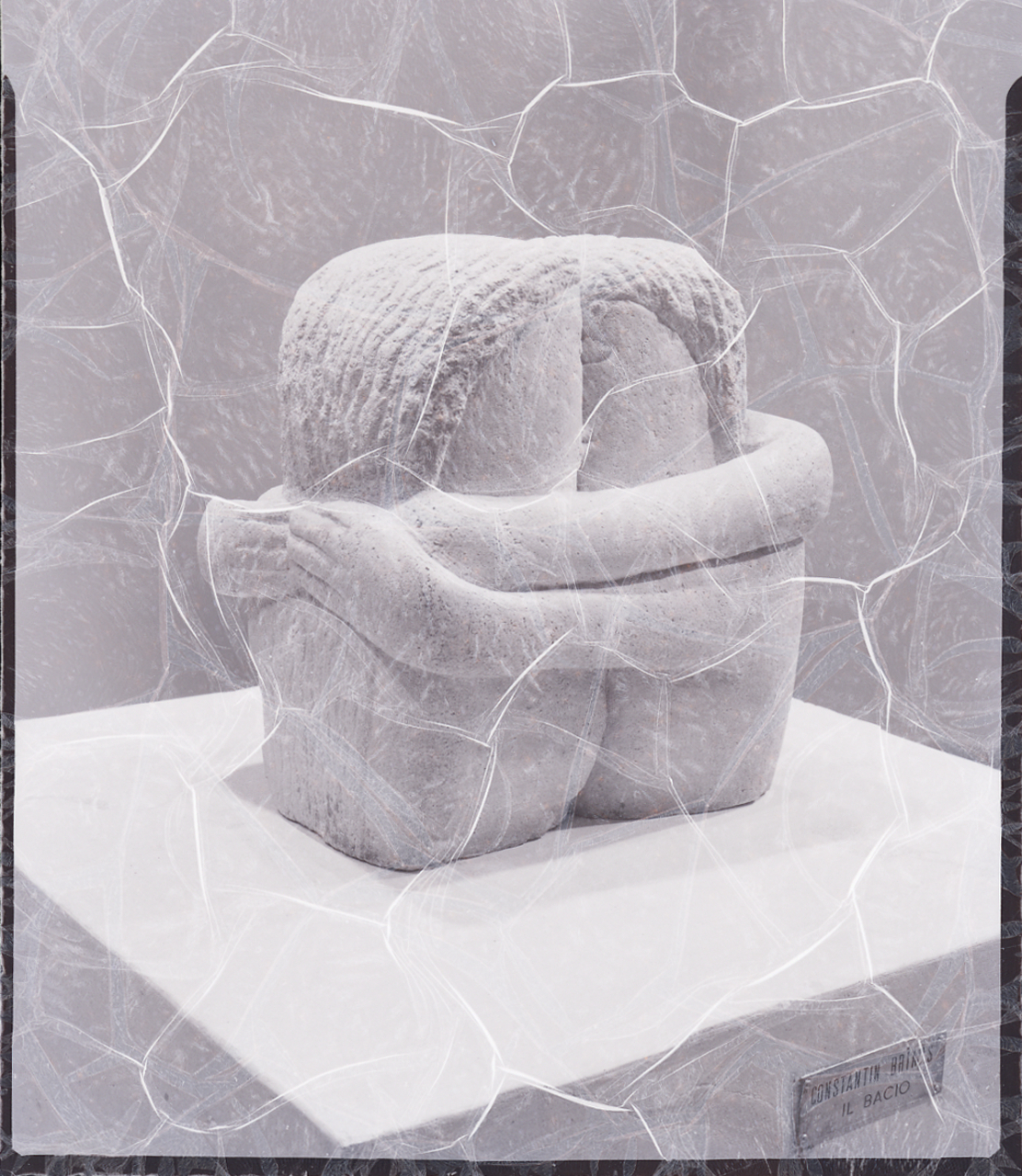 Constantin Brancusi, "Il Bacio" [...] 1908-1931 ca., sculture. Servizio fotografico : Italia, 1963 / Paolo Monti. - Buste: 7, Fototipi: 7 : Negativo b/n, gelatina bromuro d'argento/ pellicola ; 10x12. - ((Serie costituita da 7 buste di negativi senza numero identificativo, e tenute insieme da una graffetta. - Su una delle buste iscrizione didascalica e documentaria manoscritta a penna e a matita: "Sculture [Vanni?] Scheiwiller/ A. Martini". - Alcuni negativi presentano segni di degrado (gelatina raggrinzita). - La suddetta serie è contenuta nella scatola di negativi senza numero identificata con la sigla "SN01G". - Il committente potrebbe essere il critico d'arte ed editore Vanni Scheiwiller. Le sculture sono state fotografate mentre erano esposte ad una mostra non identificata.